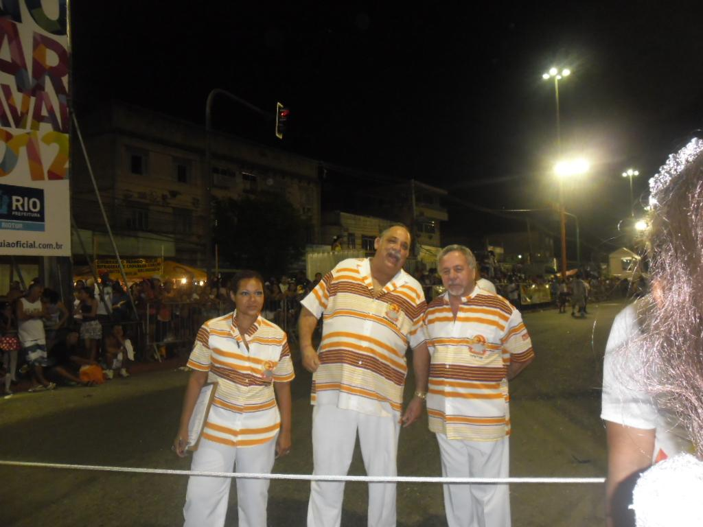 Zezinho Orelha, presidente da AESCRJ (centro), e outros dois diretores da entidade.